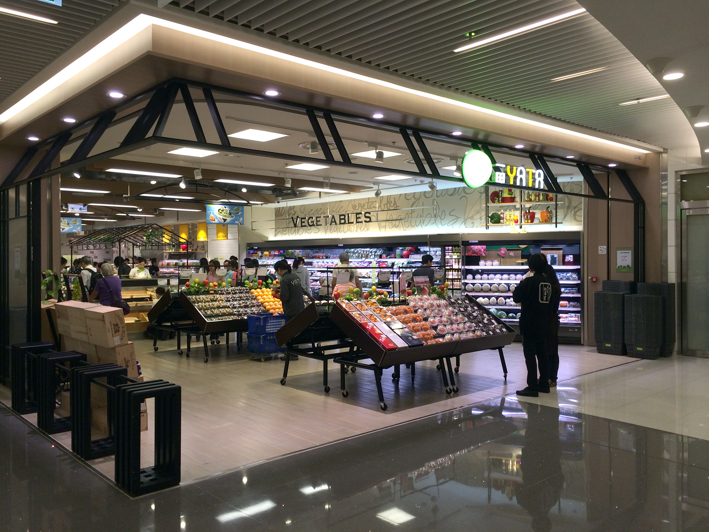 YATA Supermarket in apm